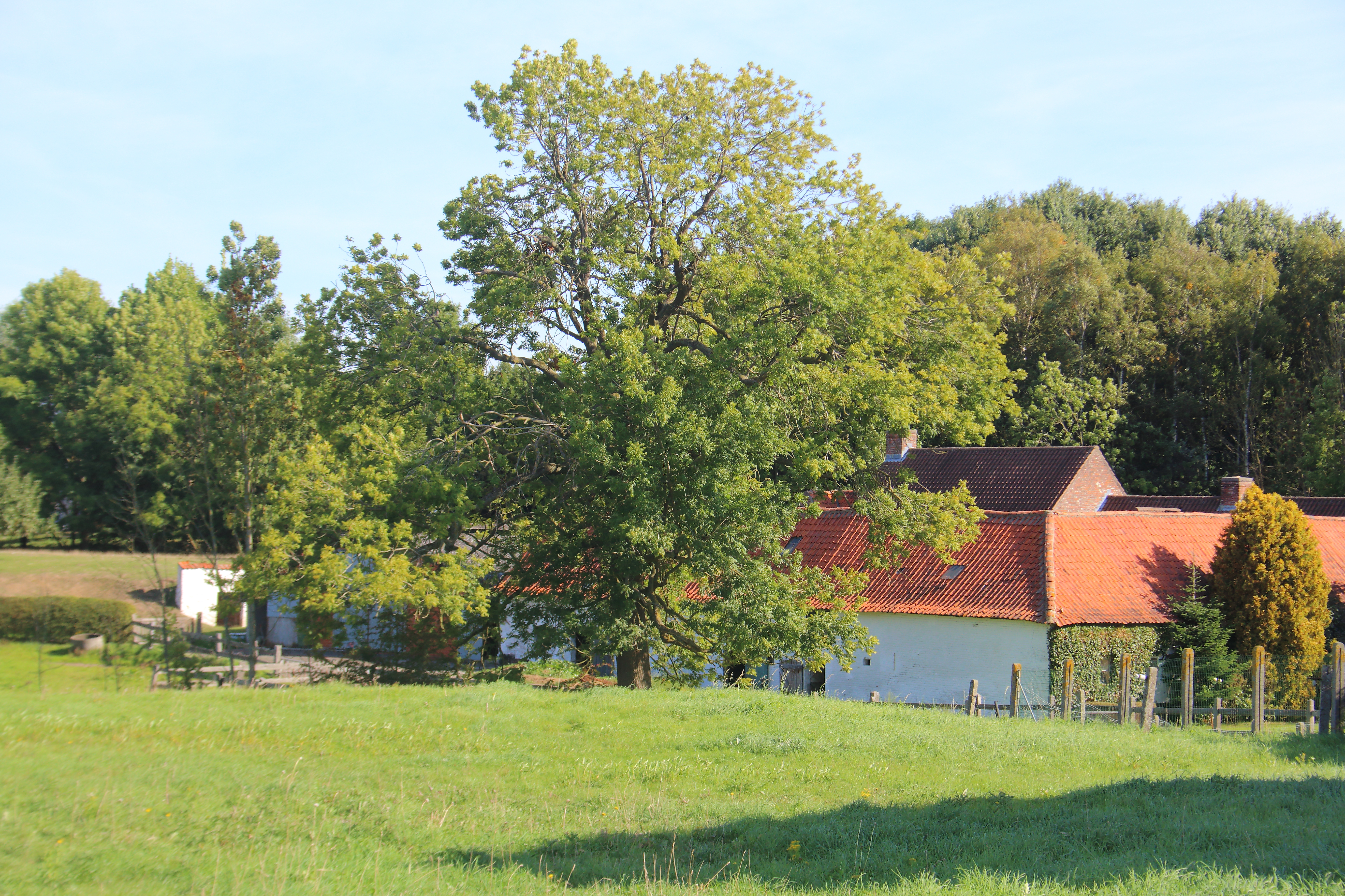 Leirenshof, Strijpen, Zottegem, Vlaanderen, België